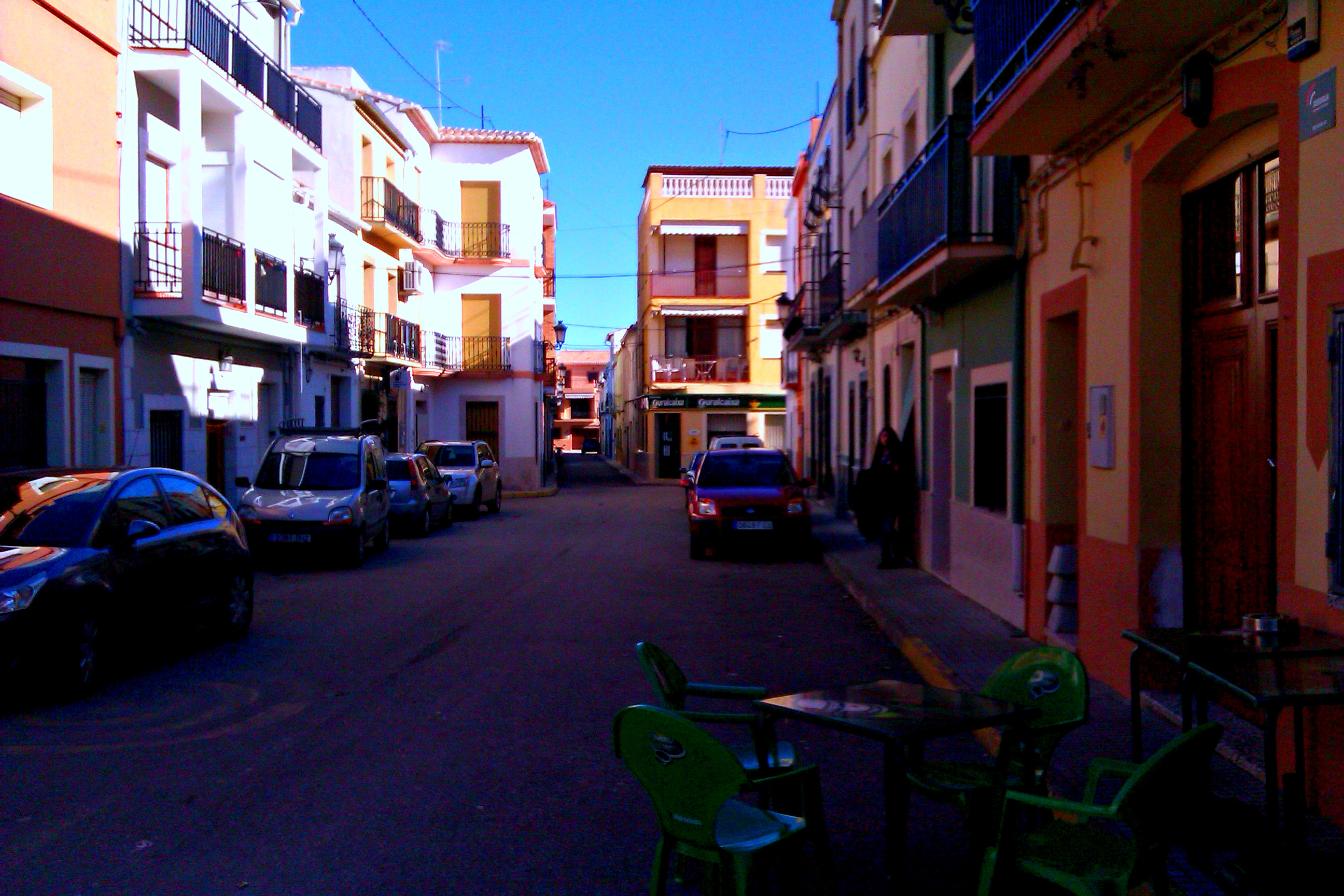 La Plaça del Mercat de Benigembla